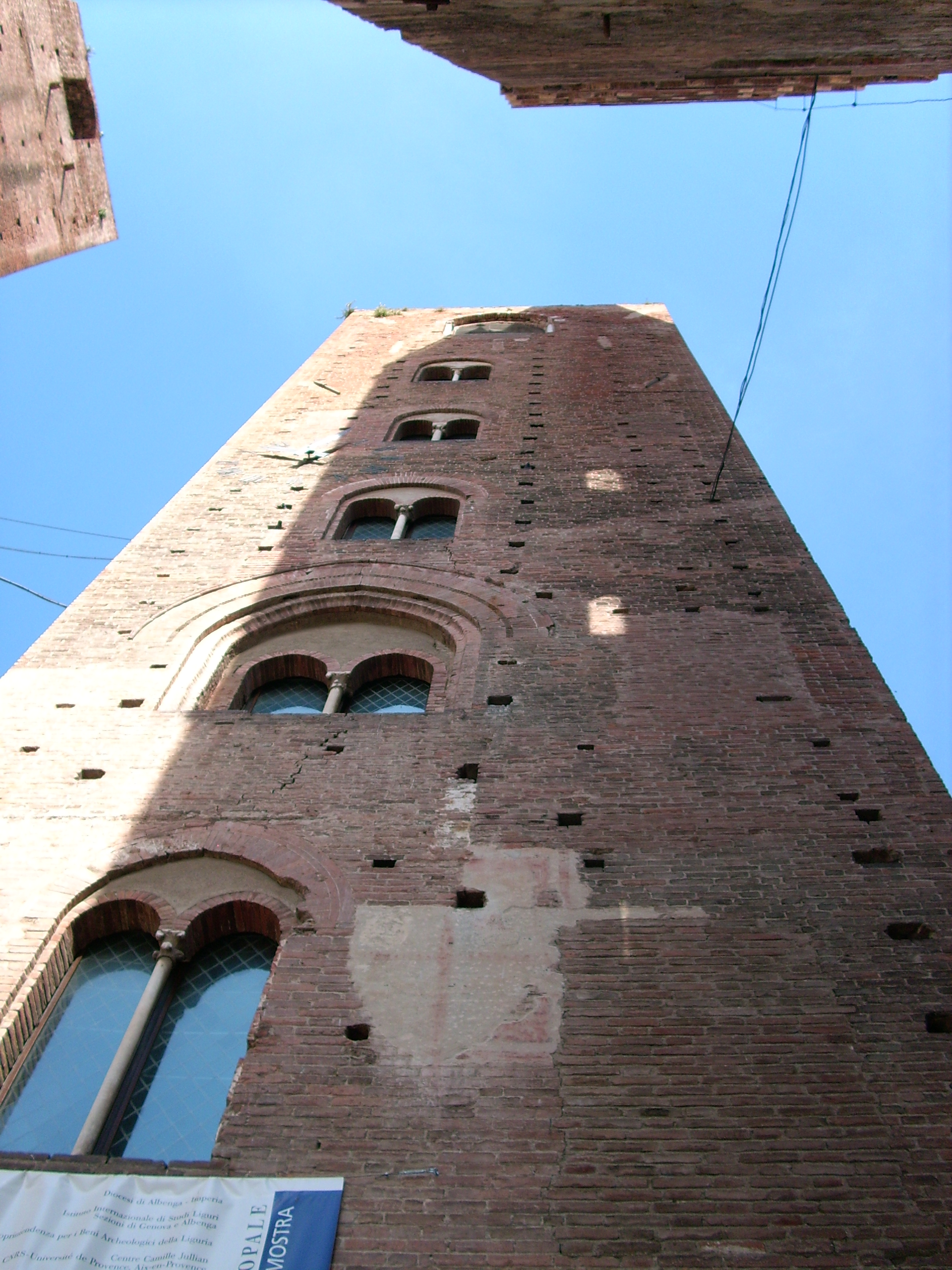 Centro storico di Albenga, Liguria, Italia